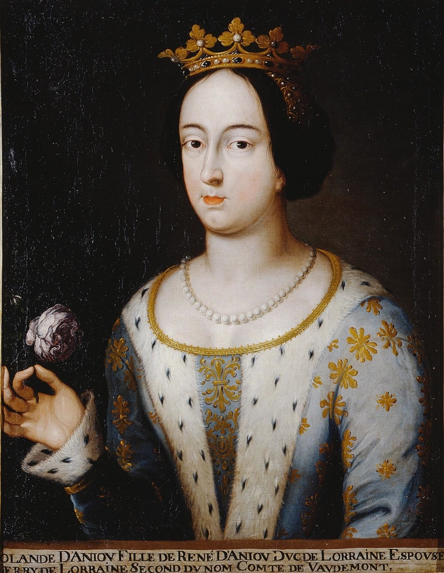 Iolanda d'Angiò (1428-1483), duchessa di Lorena e di Bar, moglie di Federico II di Lorena, conte di Vaudémont